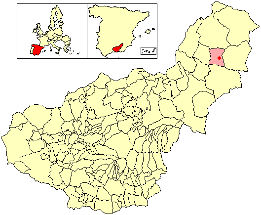 Situación de la localidad de La Alquería (en el municipio de Galera) respecto a la provincia de Granada, en España.